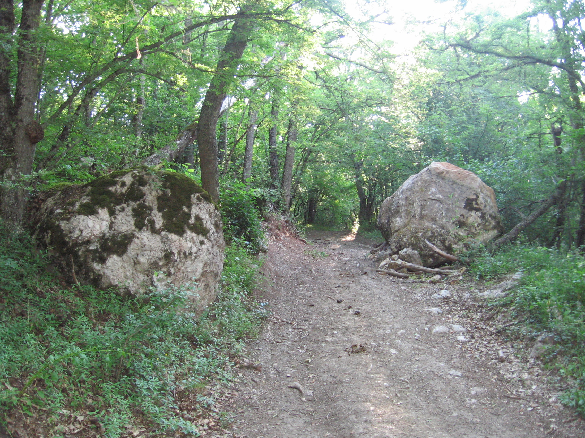 Фото